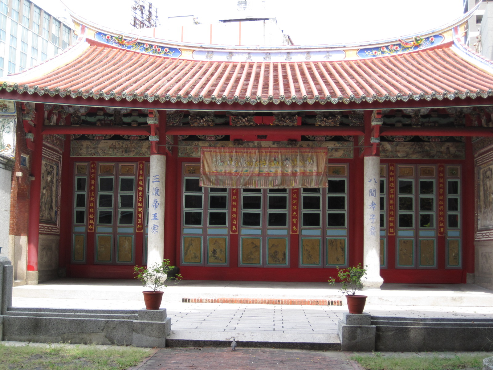 全臺吳氏大宗祠